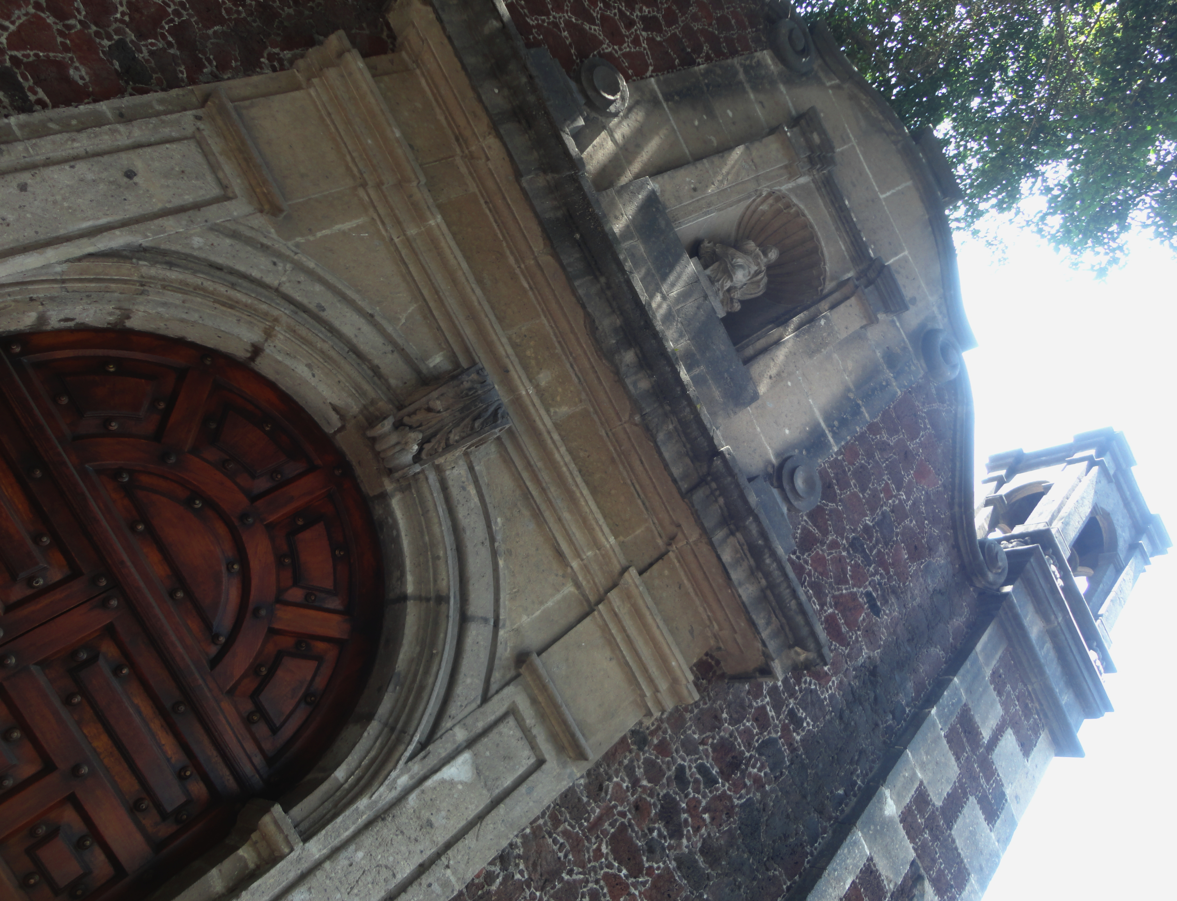 Iglesia de Santa Clara (Biblioteca del H. Congreso de la Unión), Ciudad de México.